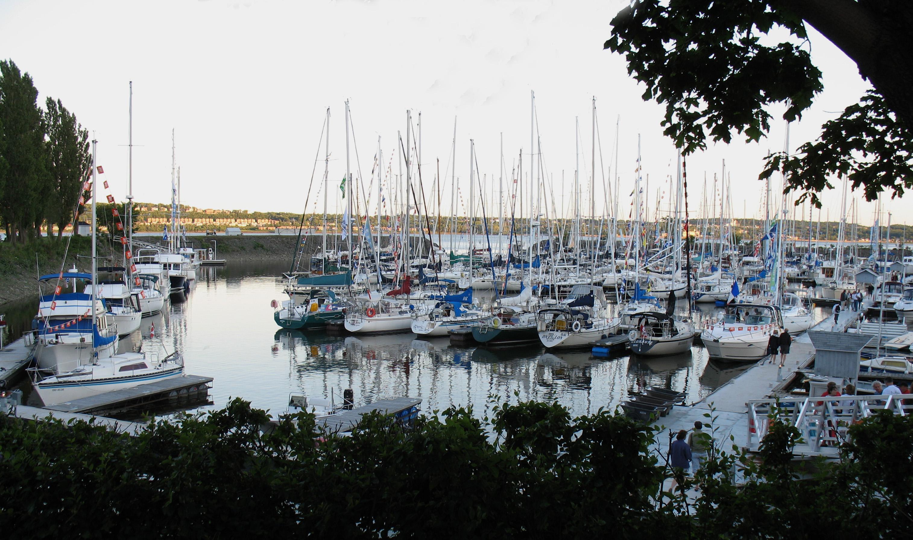 Yacht-Club de Québec, ville de Québec, province de Québec, Canada